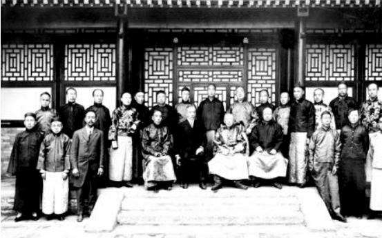 中文（中国大陆）: 盛宣怀与北洋大学堂部分教师合影